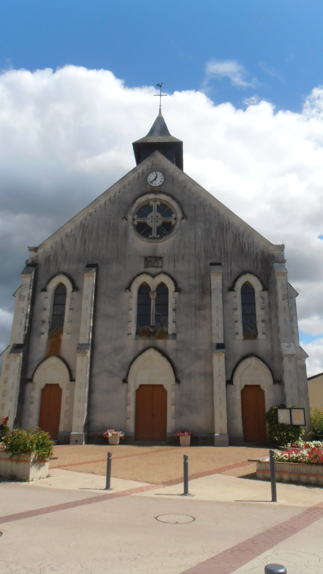 l'église du village